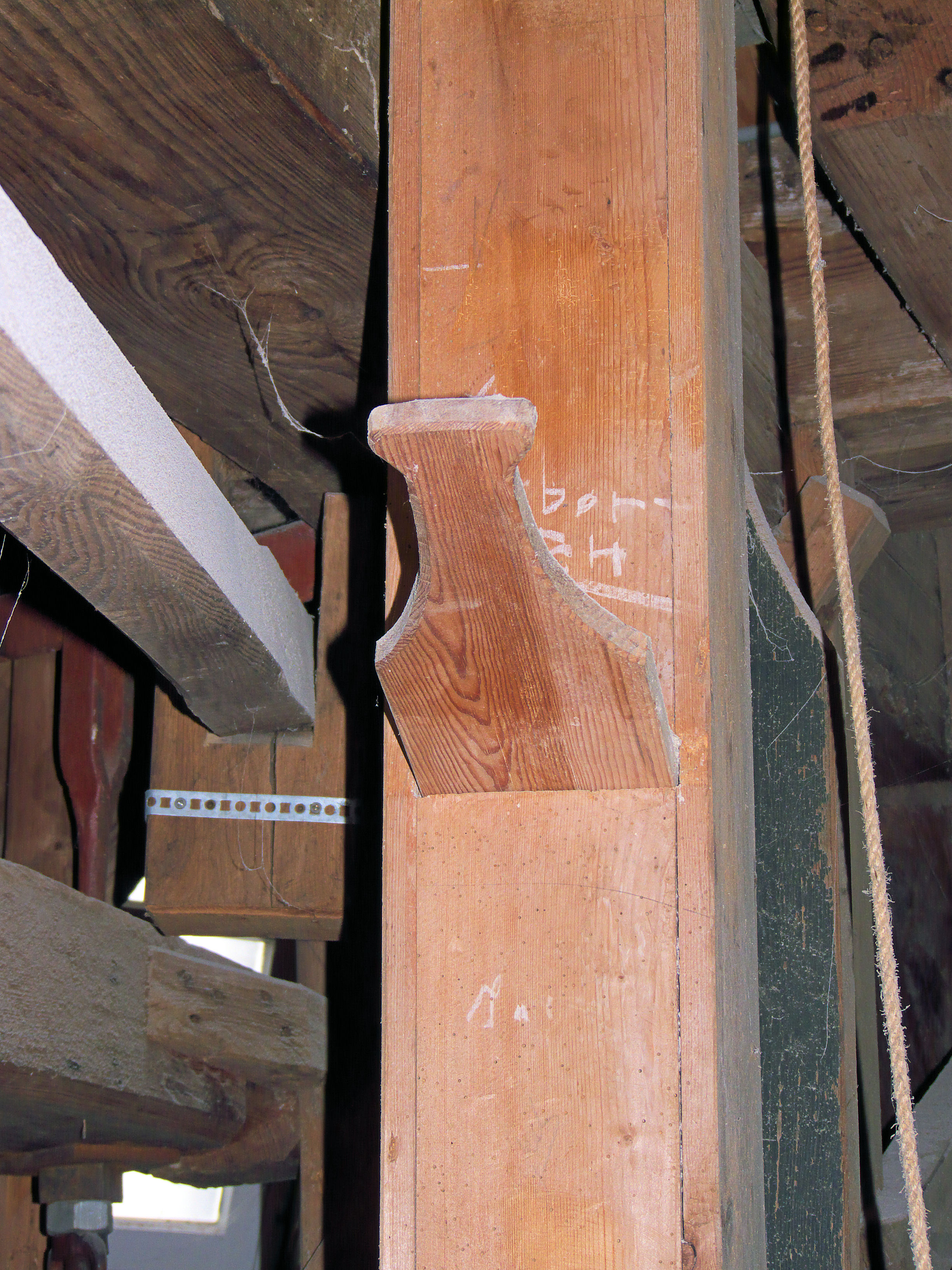 Schuifplankje tegen stuiven in de meelpijp van de Walderveense molen